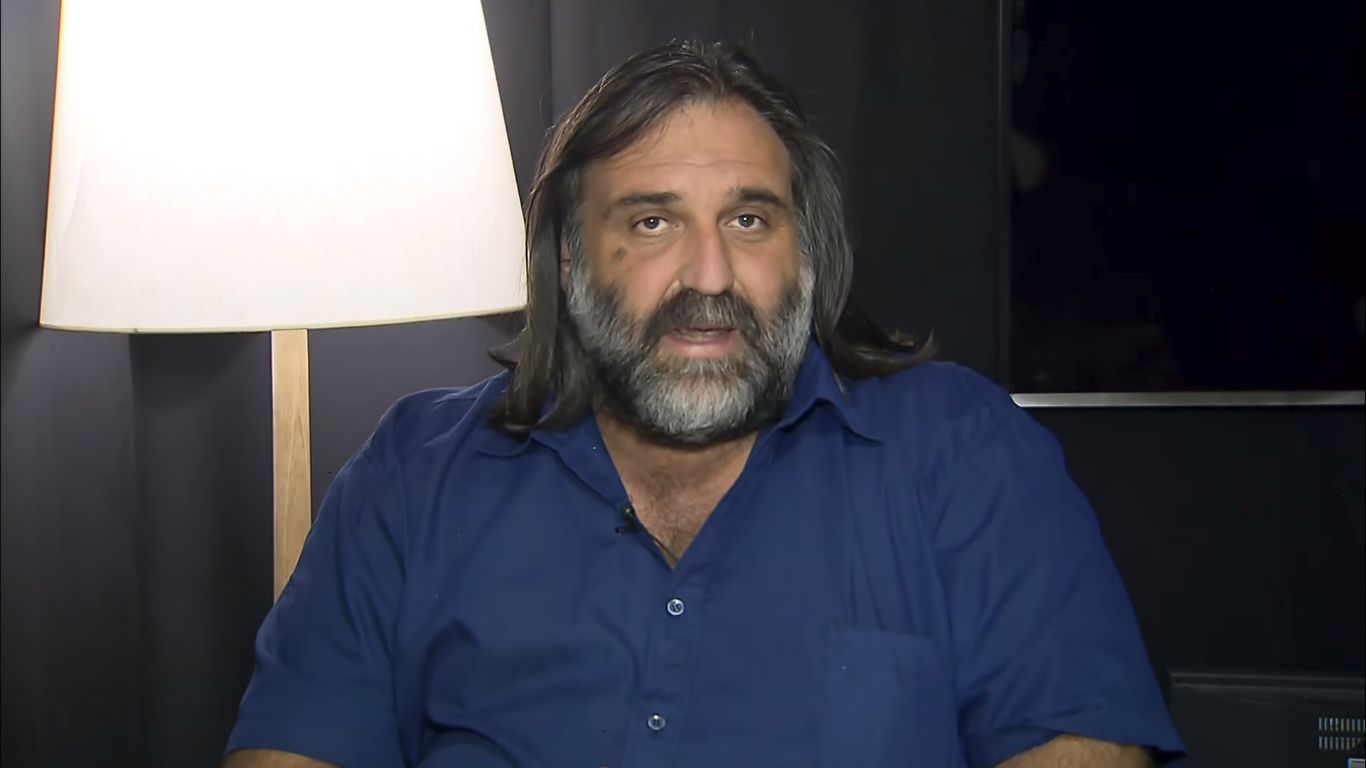 Roberto Baradel